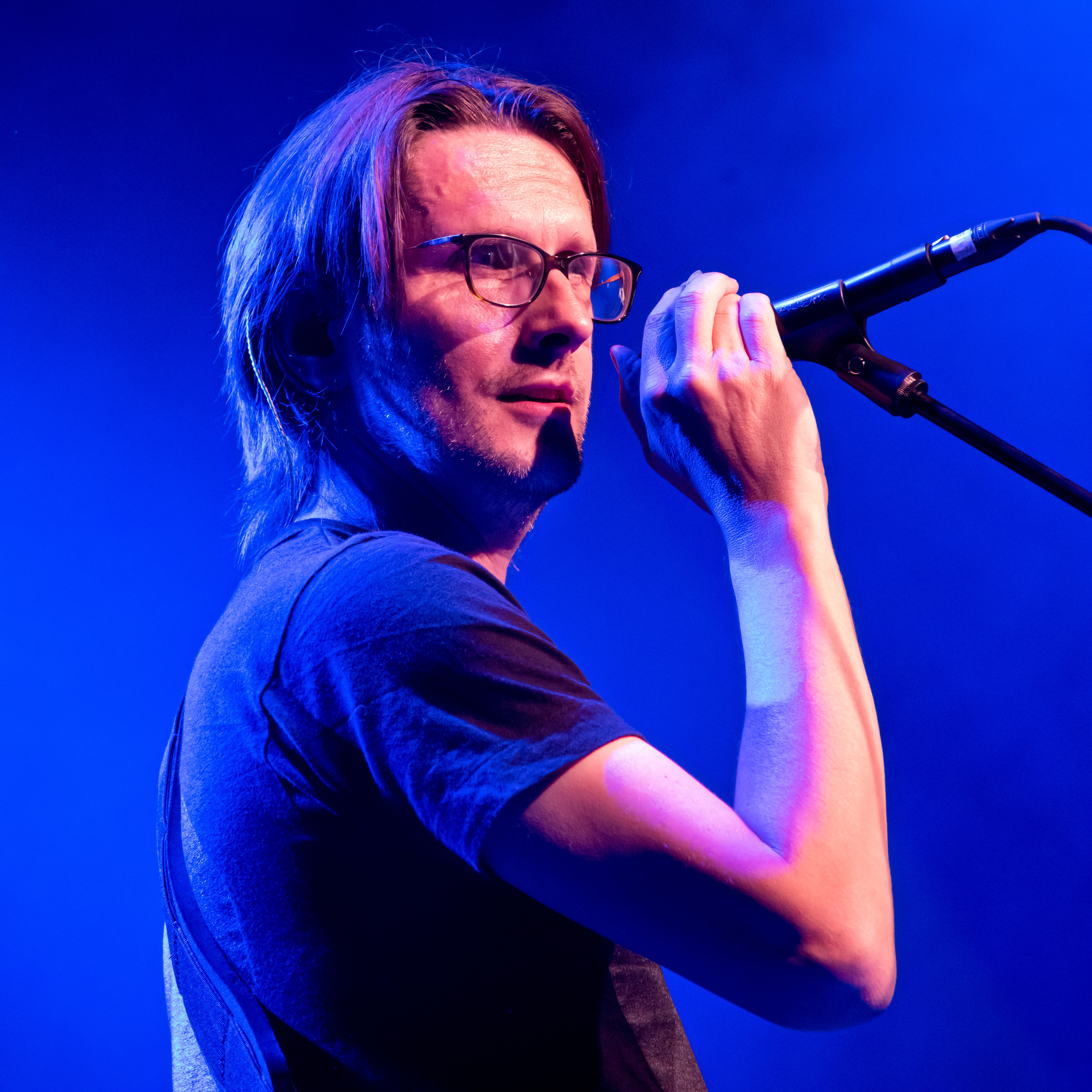 Bilder vom Zelt Musik Festival 2018 in Freiburg im Breisgau Das Eröffnungskonzert mit Steven Wilson